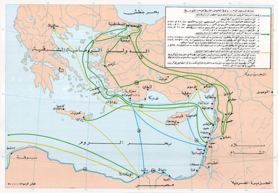 نشاط المُسلمين الجهادي وفُتُوحاتهم في الحوض الشرقي للبحر المتوسِّط بدايةً من العصر الراشدي وانتهاءً بِالعصر العبَّاسي.